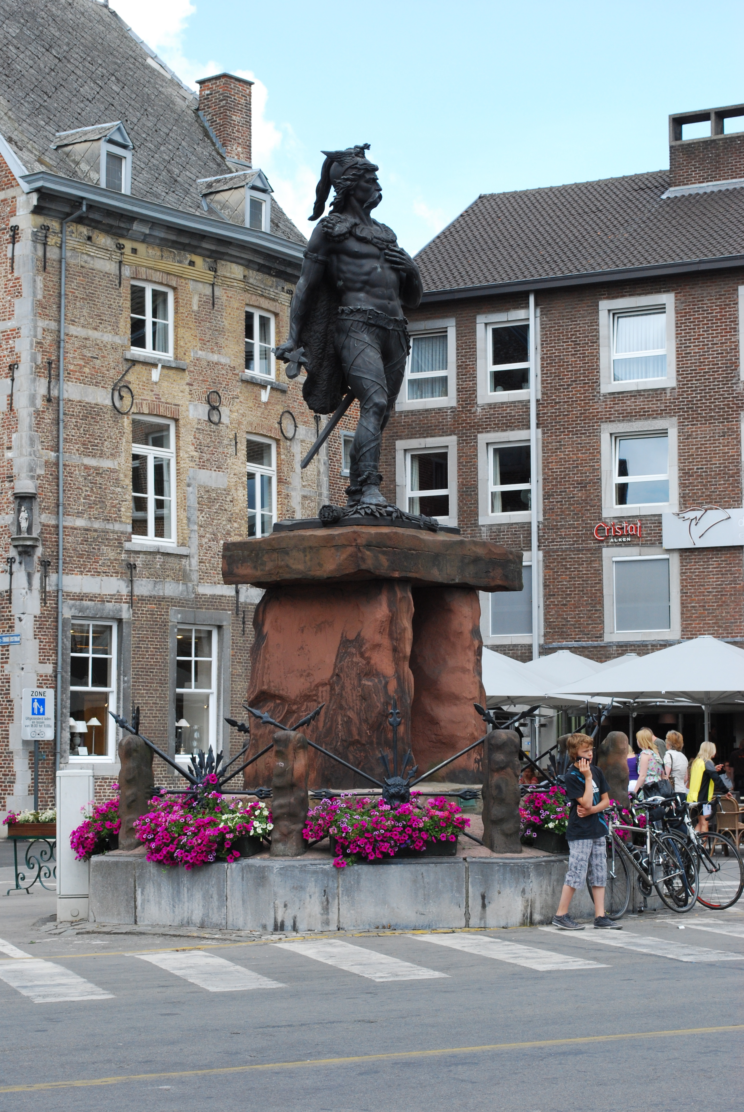 Tongres : la statue d'Ambiorix sur Grote Markt.